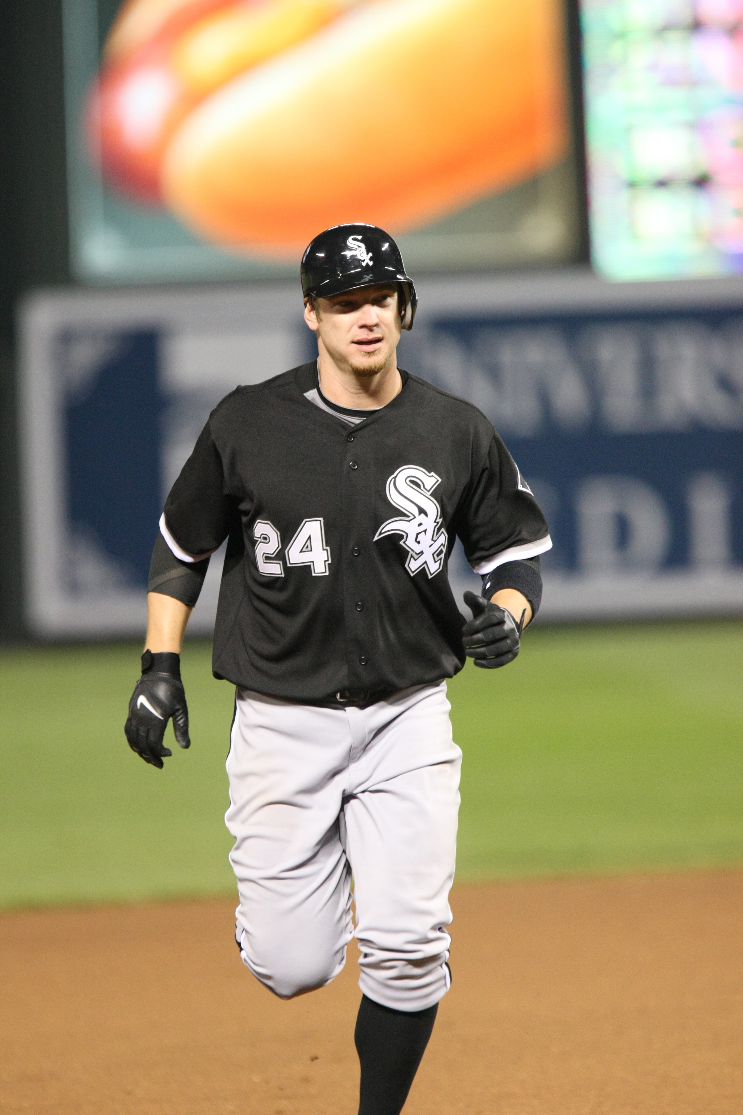 Joe Crede